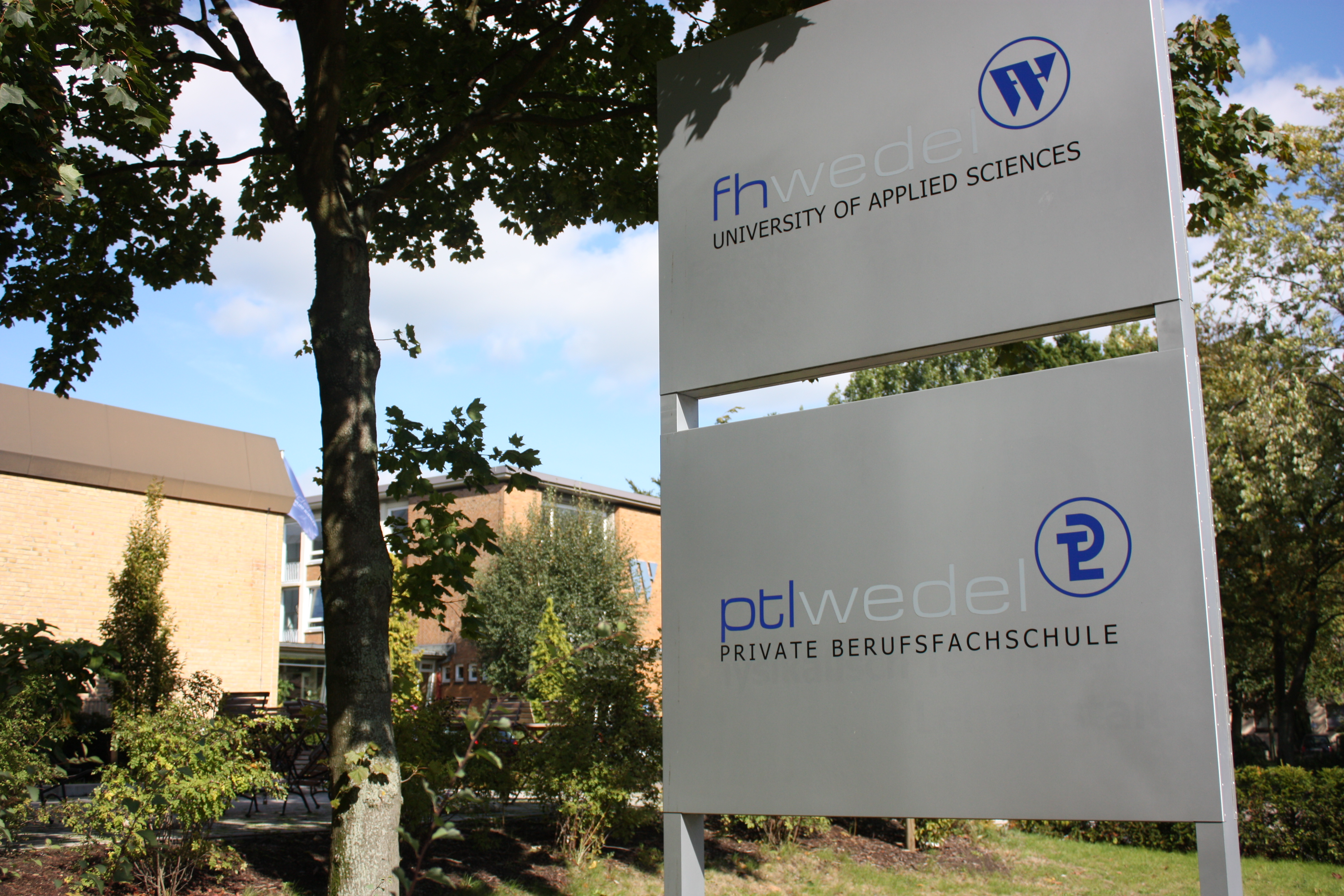 Dieses Foto zeigt die Logos der Fachhochschule Wedel und der privaten Berufsfachschule PTL Wedel.